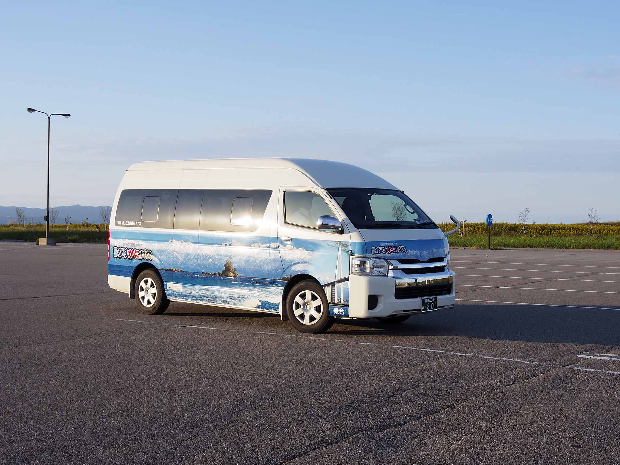 富山地鉄バスが運行する富山ぶりかにバス。富山駅から射水市の新湊きっときと市場を結び、専用のラッピングが施されたトヨタ・ハイエースで運行する。 登録番号：富山330あ・801 撮影地：富山県射水市、新湊きっときと市場